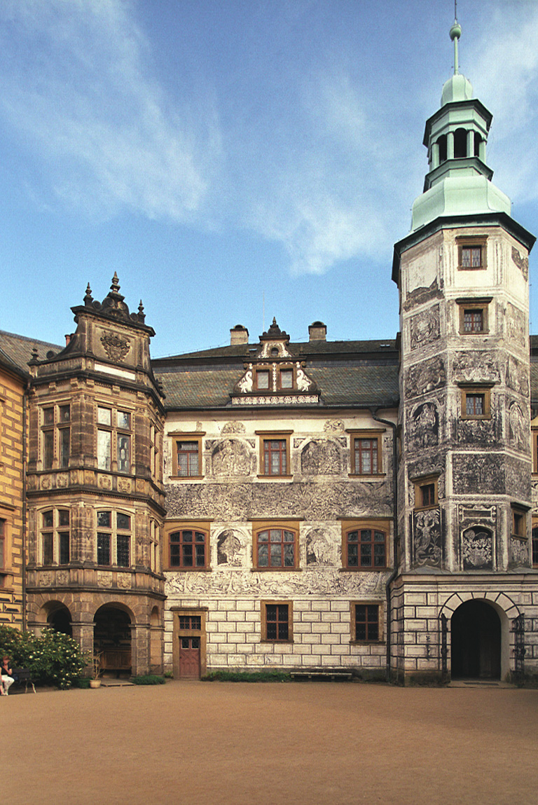 Frydlant